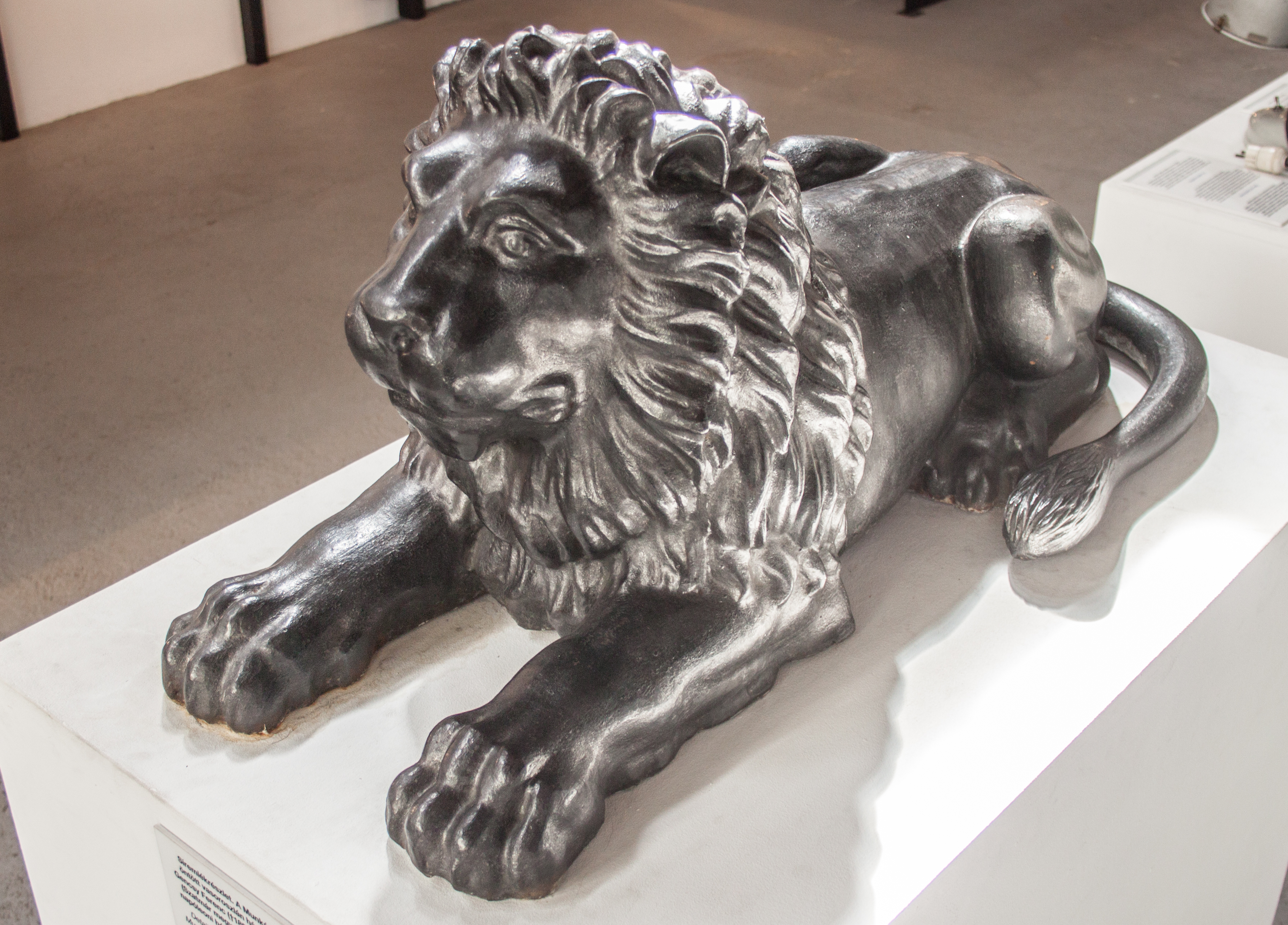 Cast iron lion, detail of a grave monument, Budapest Foundry Museum sculpture collectionlabel QS:Len,"Cast iron lion, detail of a grave monument, Budapest Foundry Museum sculpture collection" label QS:Lhu,"Síremlék részlete, öntöttvas oroszlán, a munkácsi vasgyár terméke"